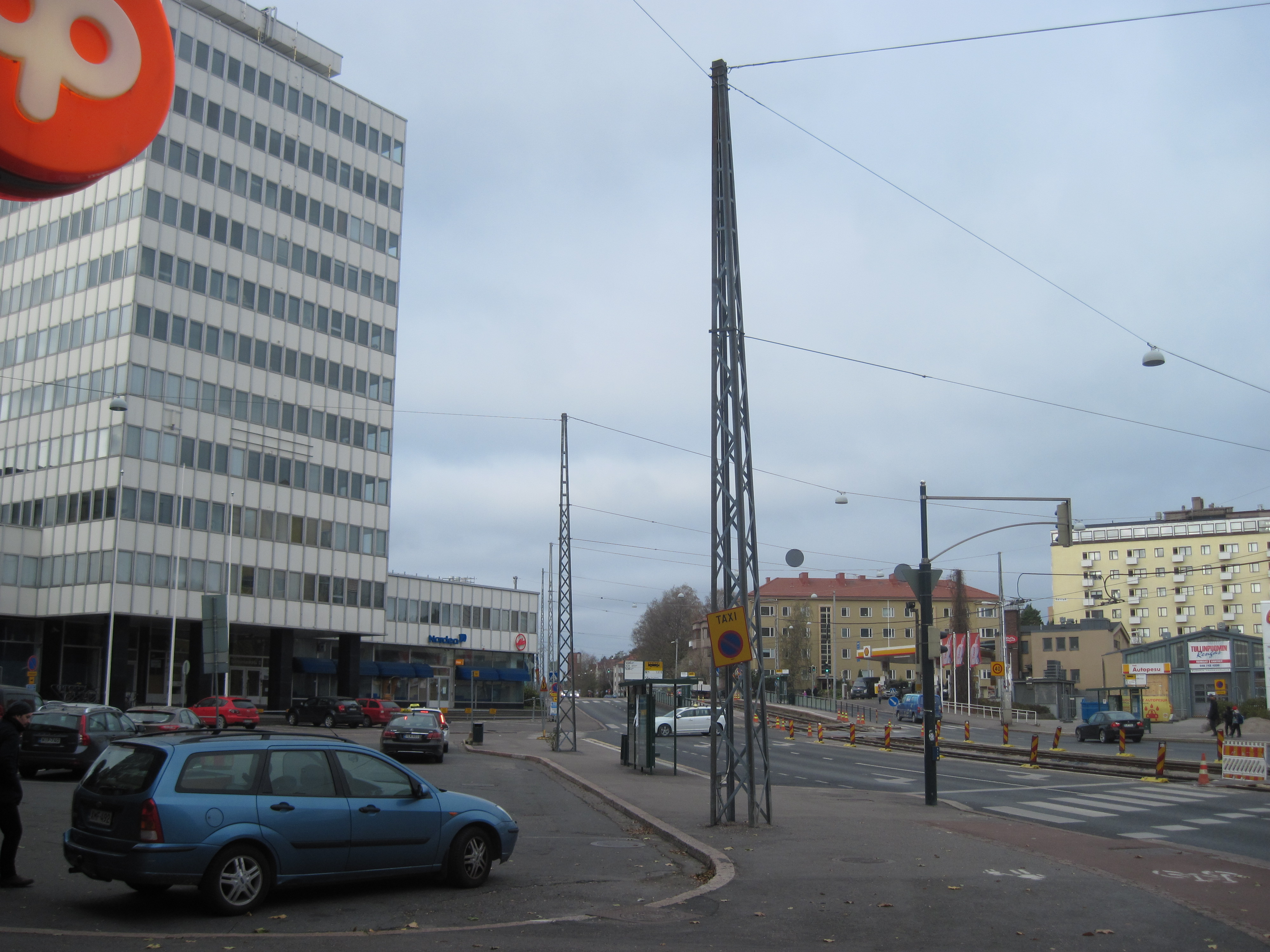 Töölön Tulli Square, Helsinki